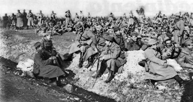 Bataljon jugoslovanske prostovoljske divizije na solunski fronti.